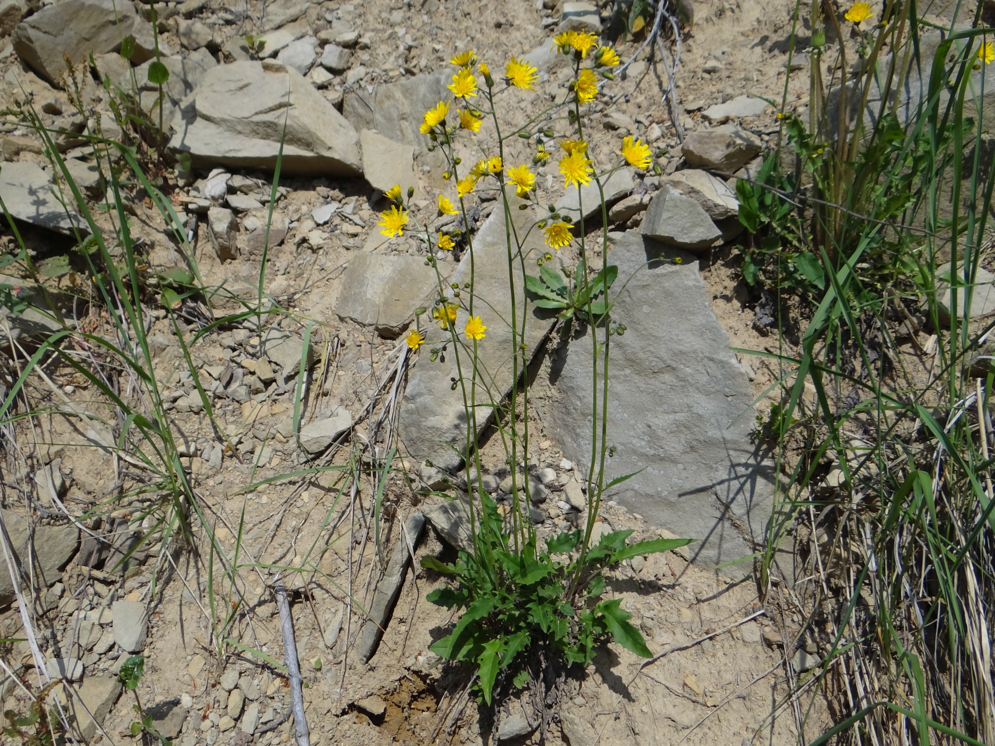 Crepis biennis (location: Poland, Beskid Wyspowy, Łopień)